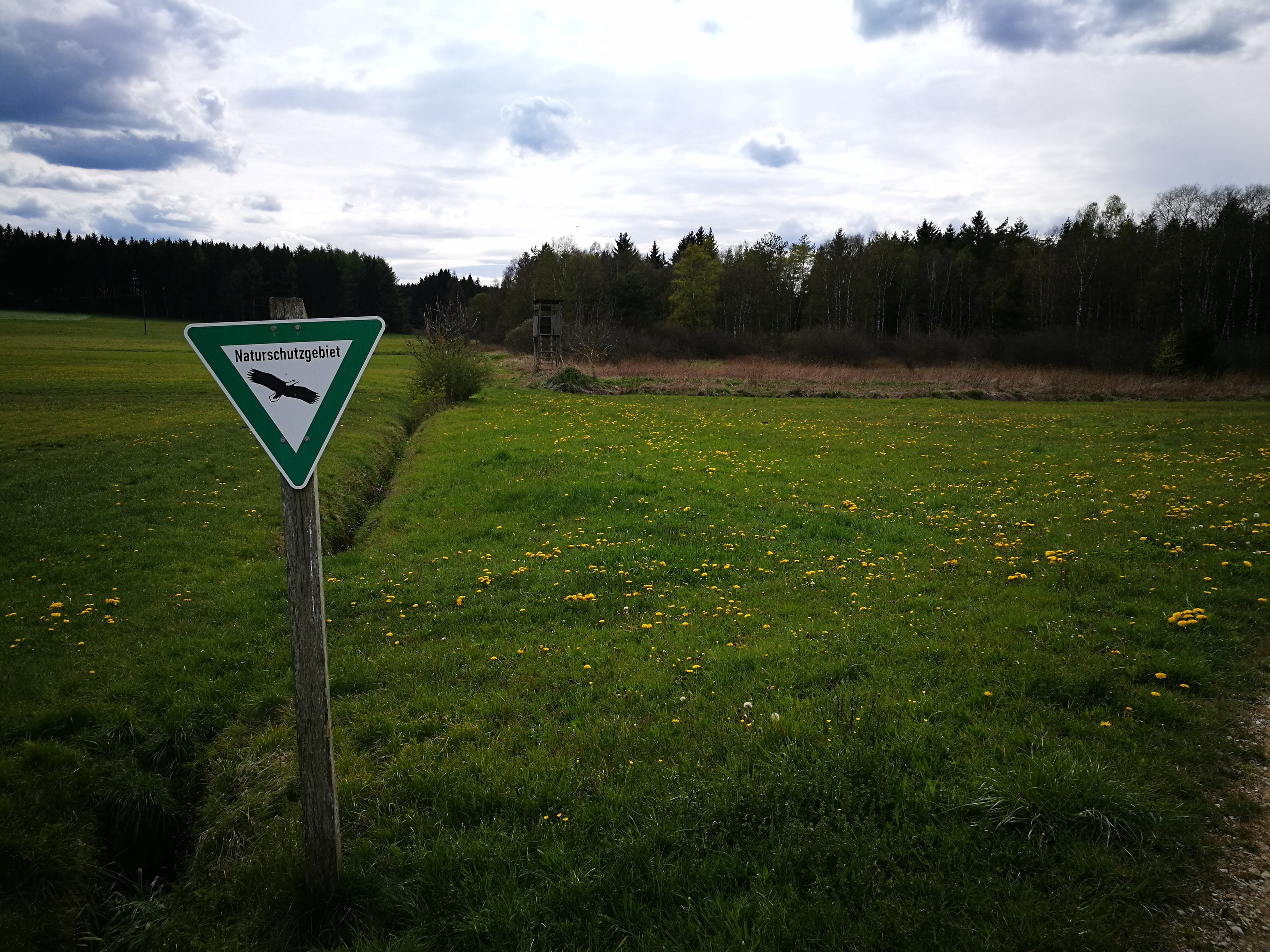 Deutschland (D) - Baden-Württemberg (BW) - Landkreis Konstanz (KN) - Hohenfels: Naturschutzgebiet "Waltere Moor"